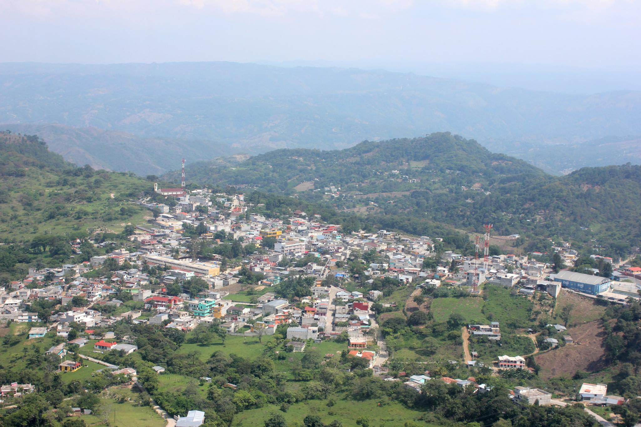 Vista panoramica de pachalum